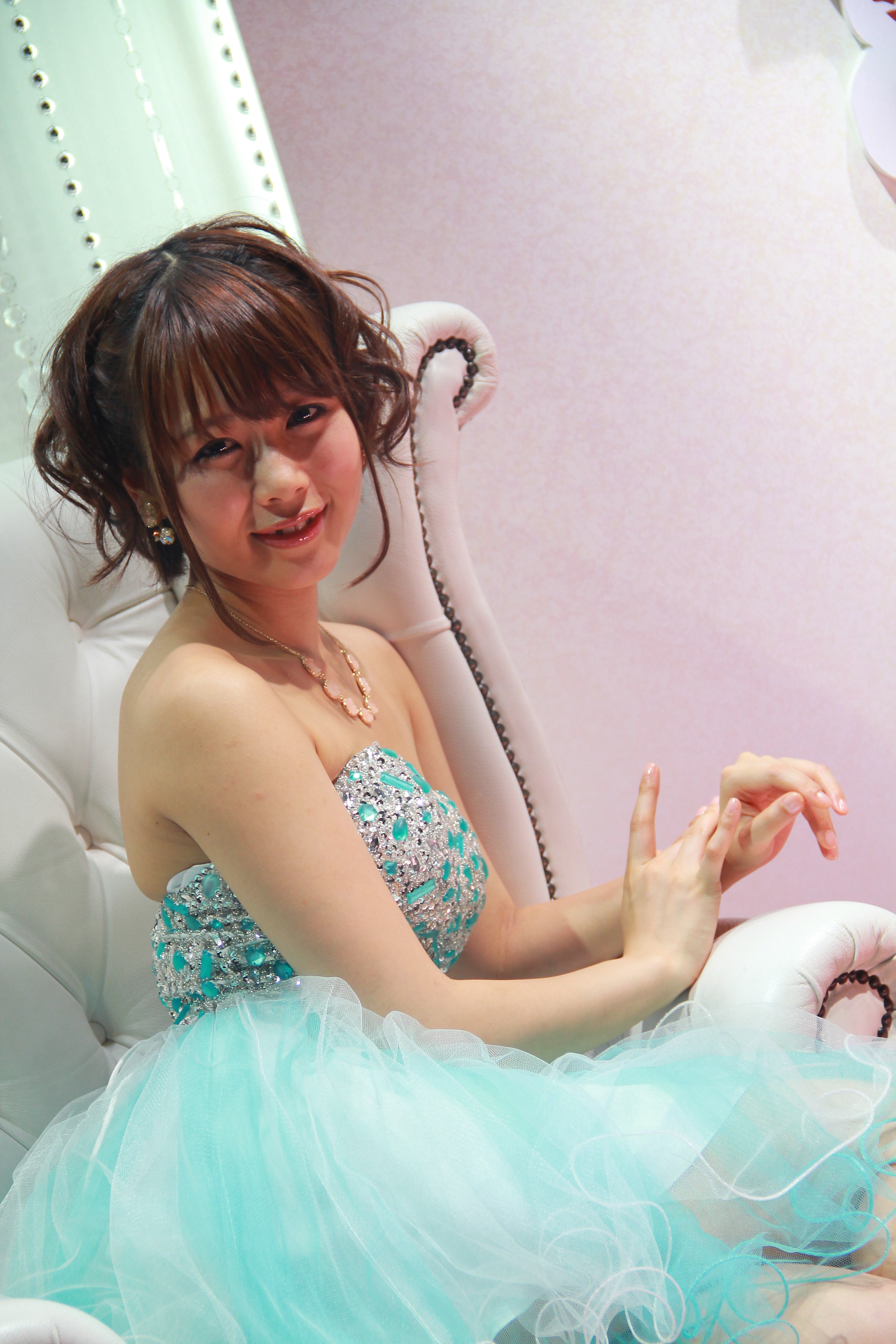 2016年東京ゲームショウ 潮田ひかる